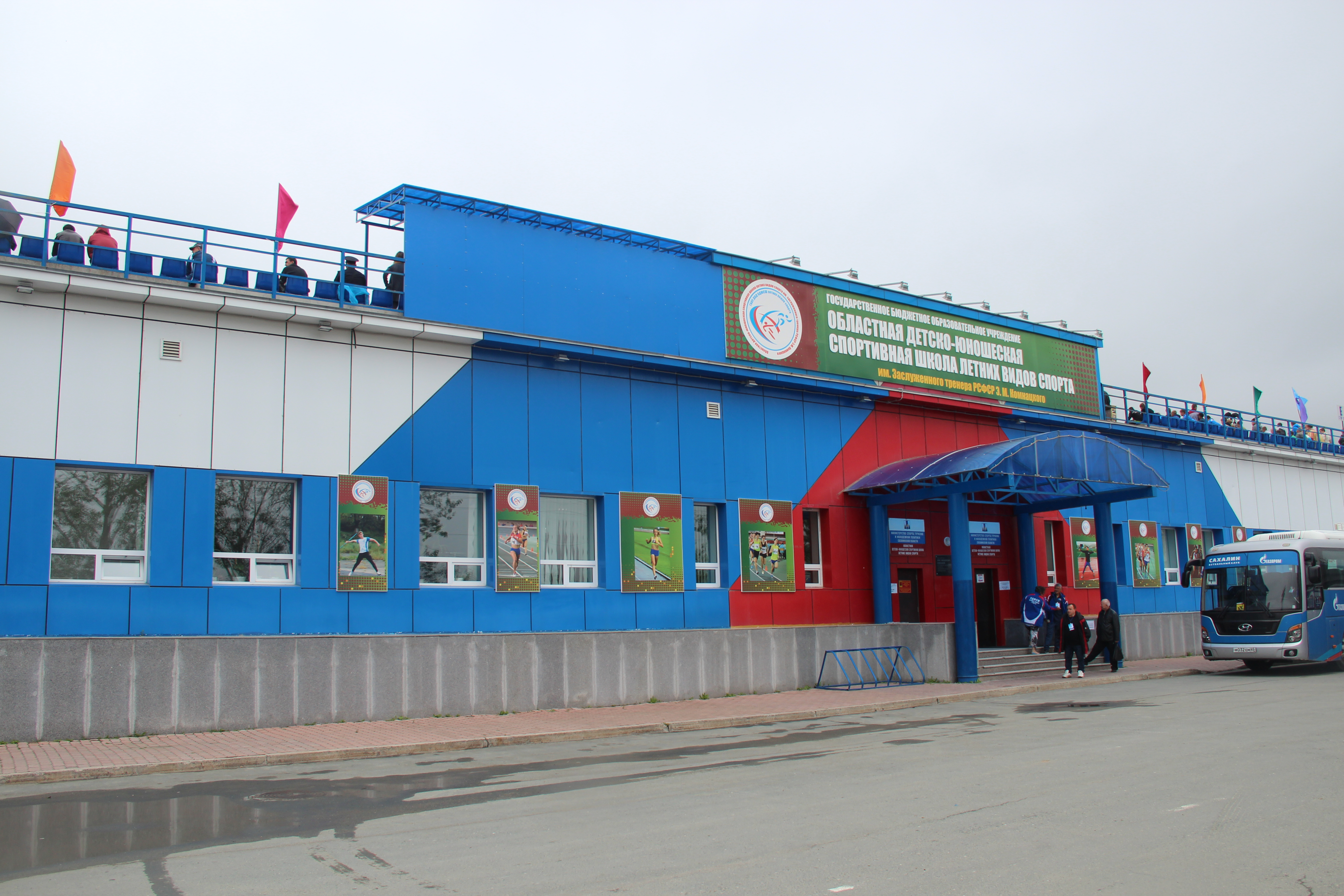 Spartak Stadium Yuzhno Sakhalinsk